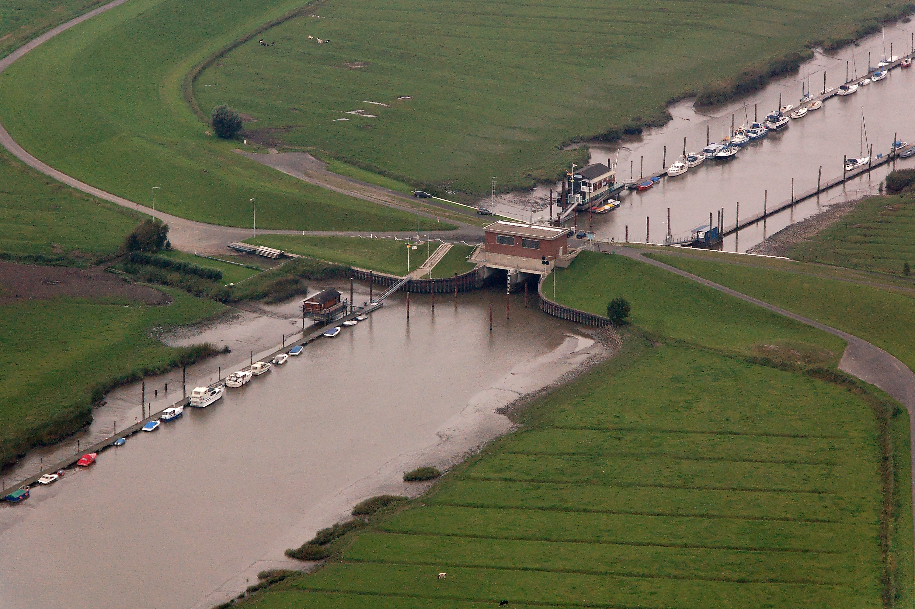 Impressionen Fotoflüge September 2011 (CPB); Ruthenstromsperrwerk, Drochtersen, Landkreis Stade, Niedersachsen, Deutschland Dieses Foto entstand aufgrund eines Projektes, das von Wikimedia Deutschland e. V. gefördert wurde. Im Rahmen des „Community-Projektbudgets“ sollen Luftbilder u.a. von Inseln, Halligen, Sanden und Küstenstädten der deutschen Nordseeküste angefertigt werden. Das Projekt „Fotoflüge“ wurde im September 2011 begonnen.